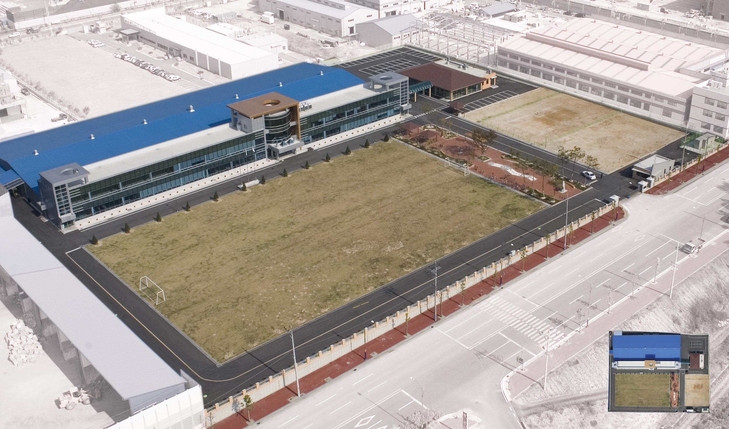 Fabrikgelände von Bixolon